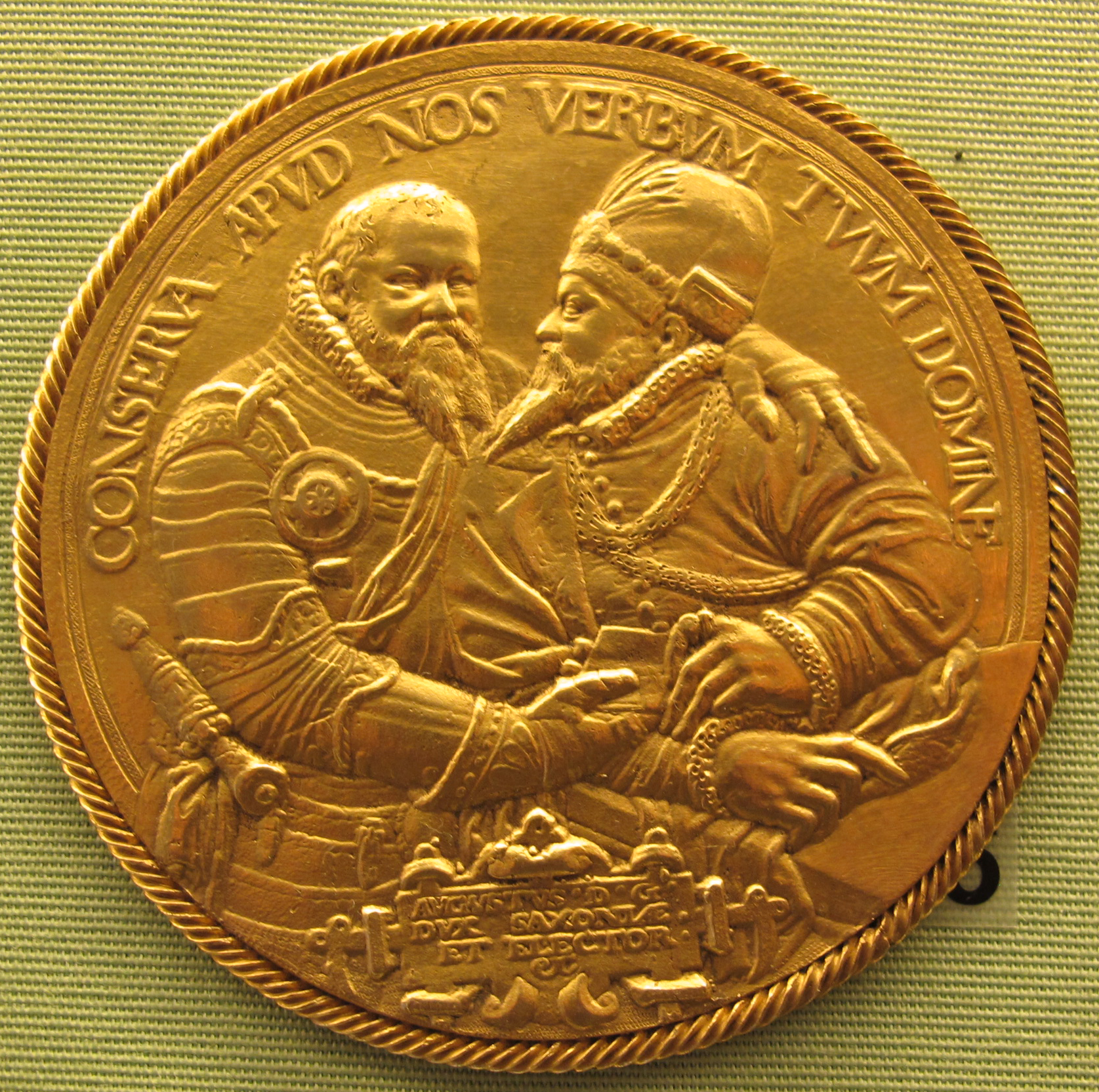 Tobias wolff, johann georg von brandenburg e august von sachsen, 1577